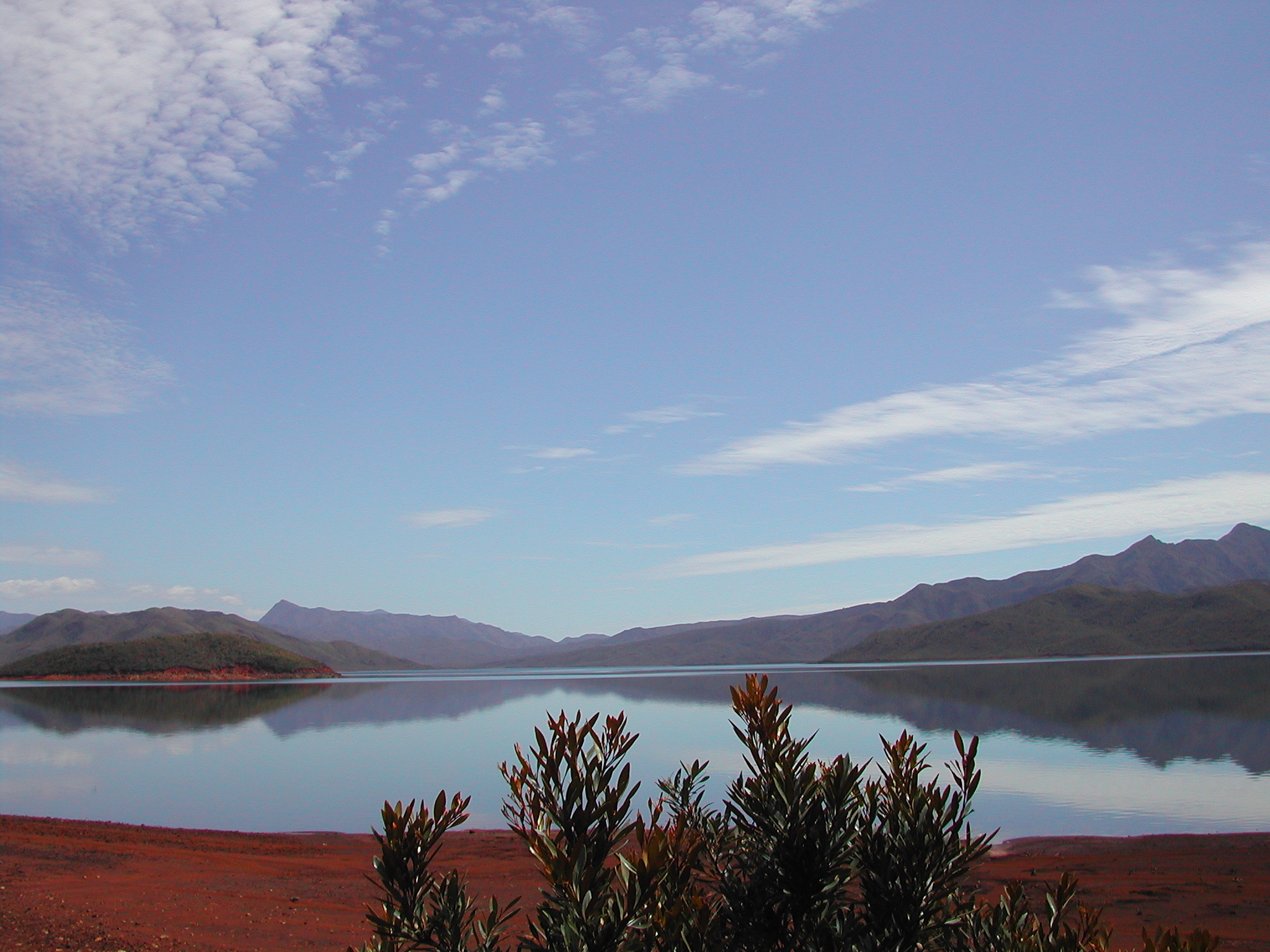 Lac de Yaté